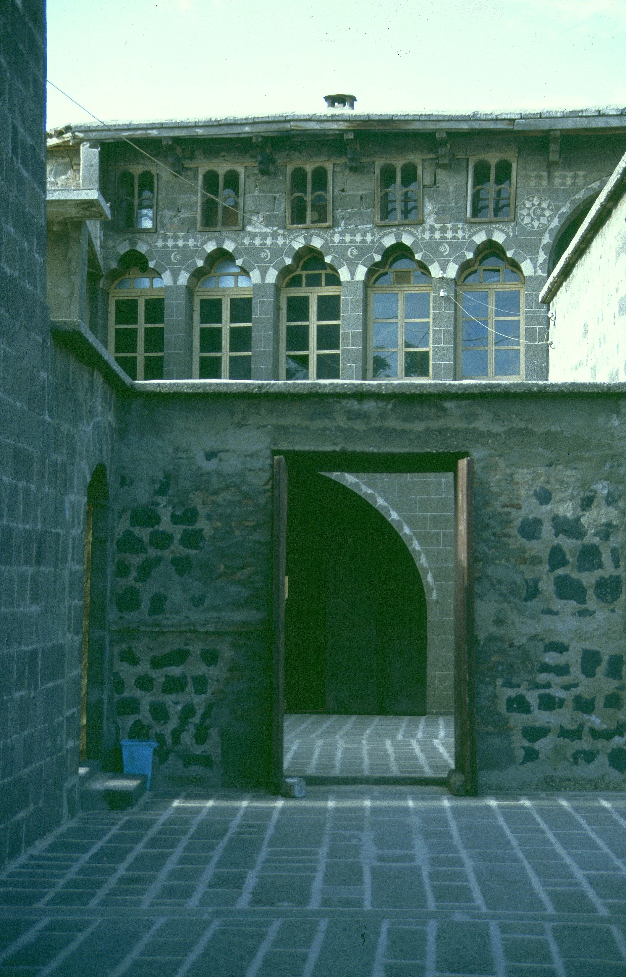 Diyarbakır: Meryem Ana Kilise